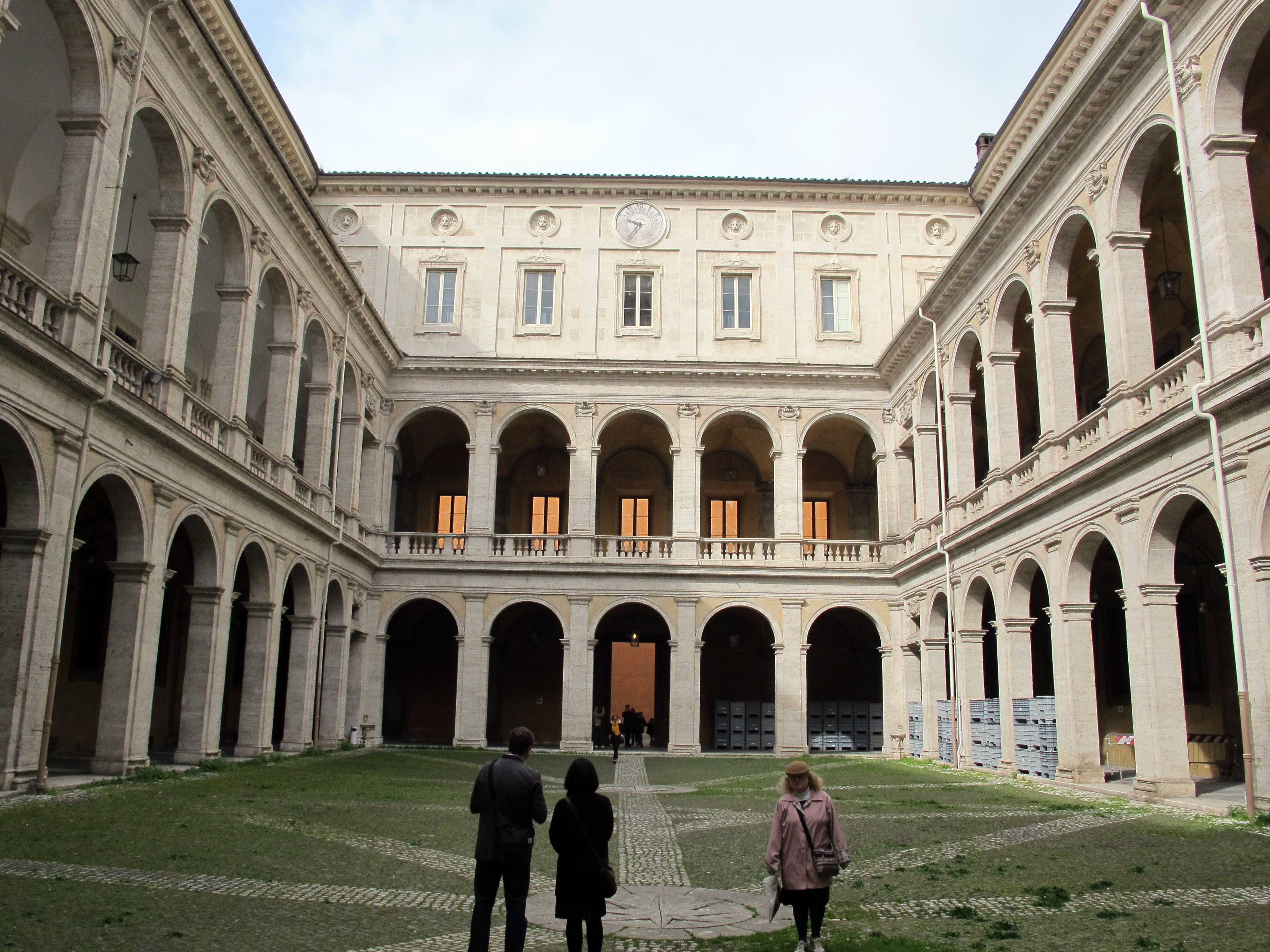 Sant'ivo alla sapienza, cortile